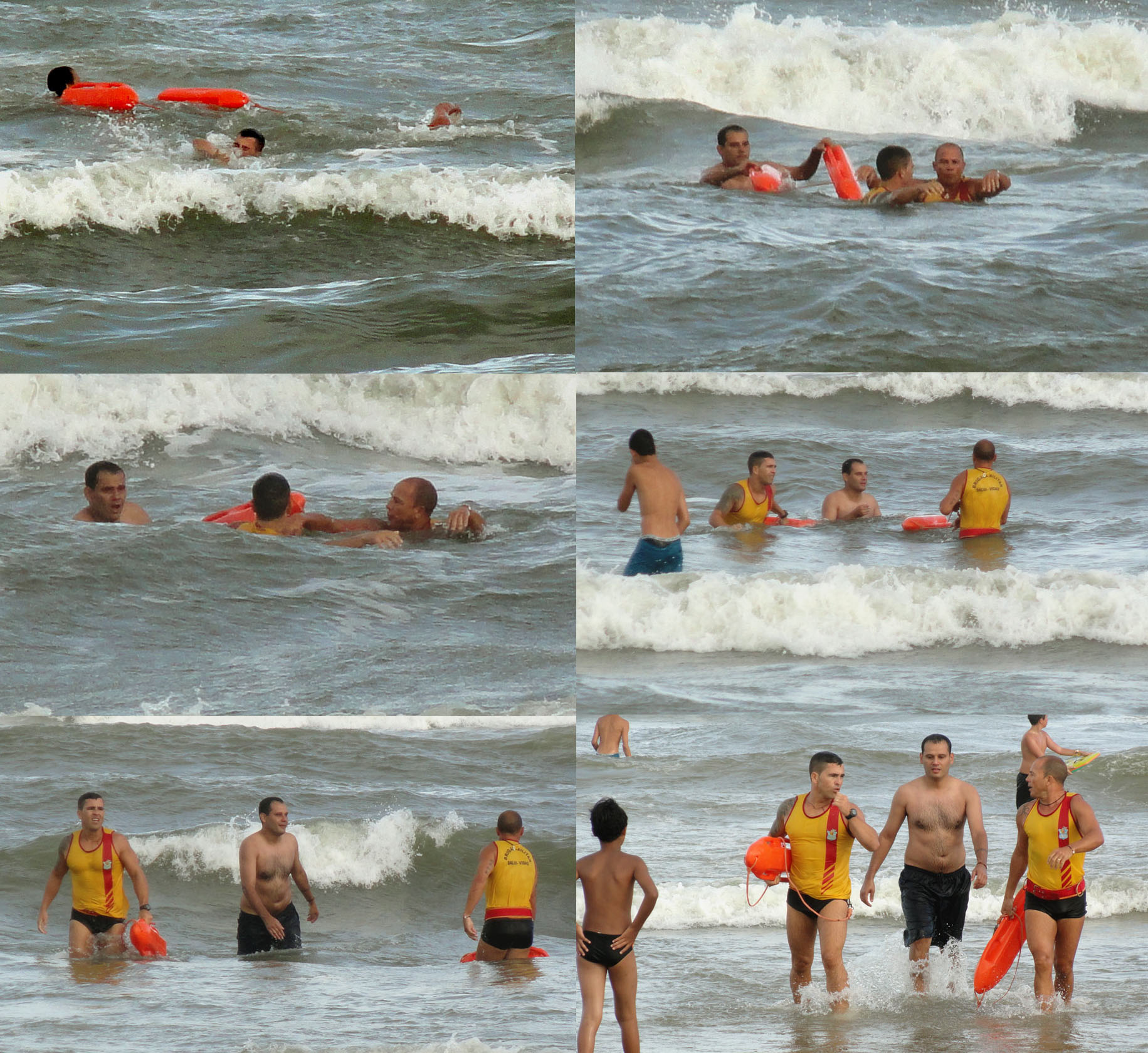 salva-vidas em Torres resgatando um banhista